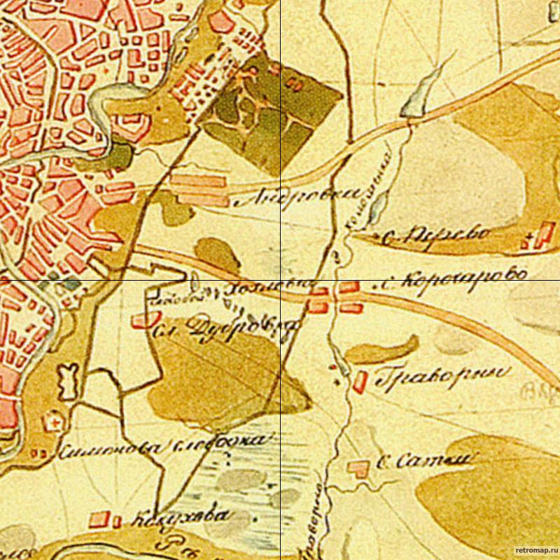 Фрагмент карты 1812 года